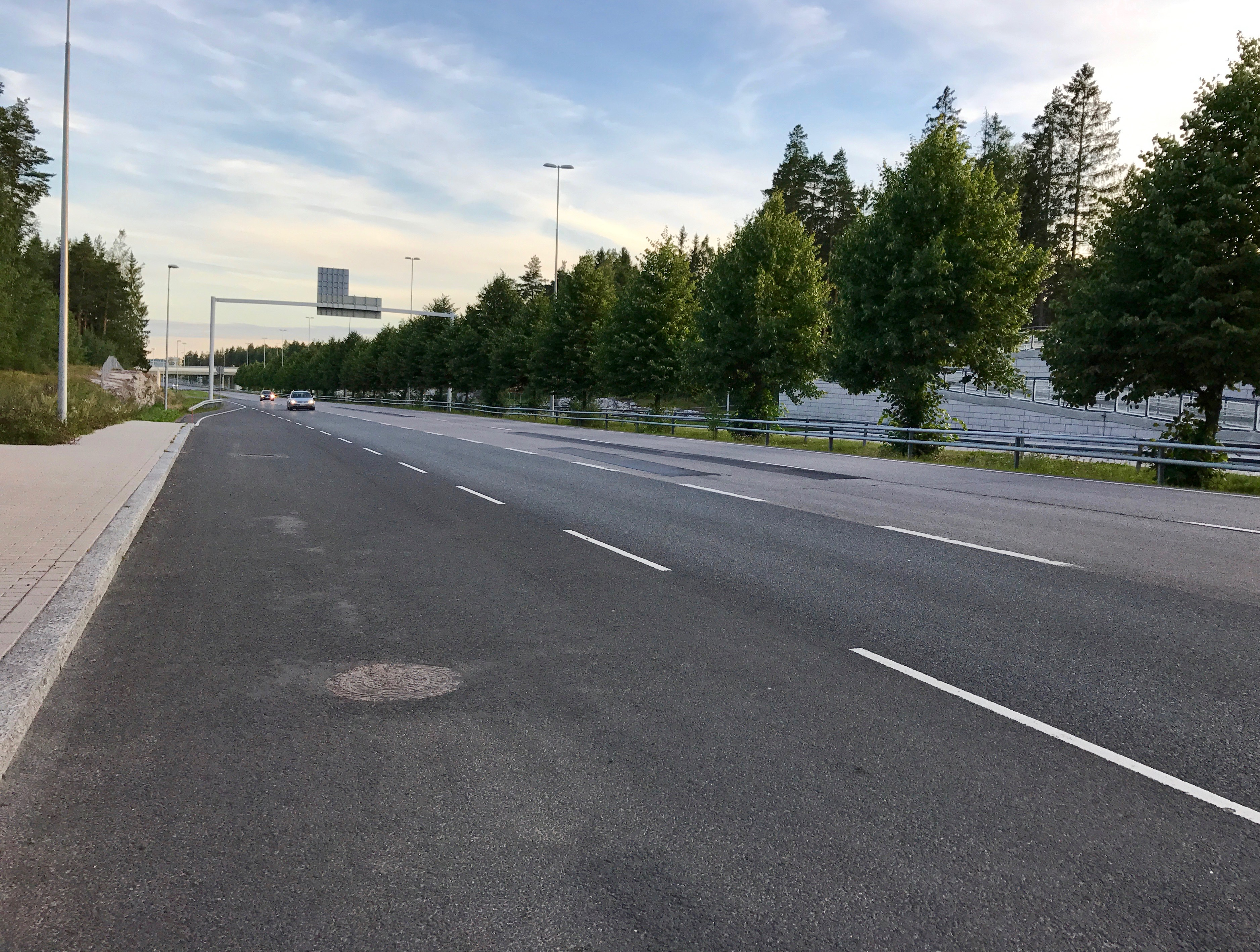 Näkymä seututie 135:ltä, etelään päin.